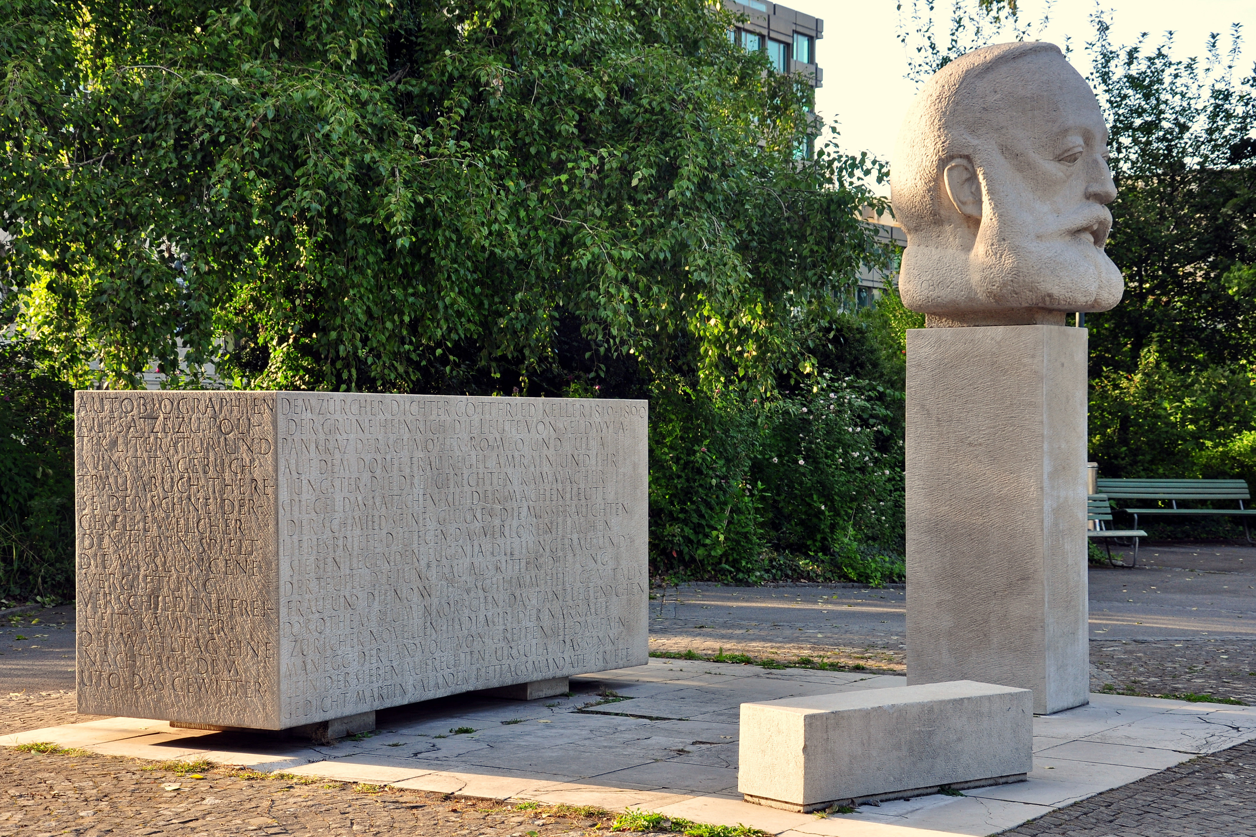 Gottfried Keller Gedenkstätte in Zürich-Enge (Switzerland)